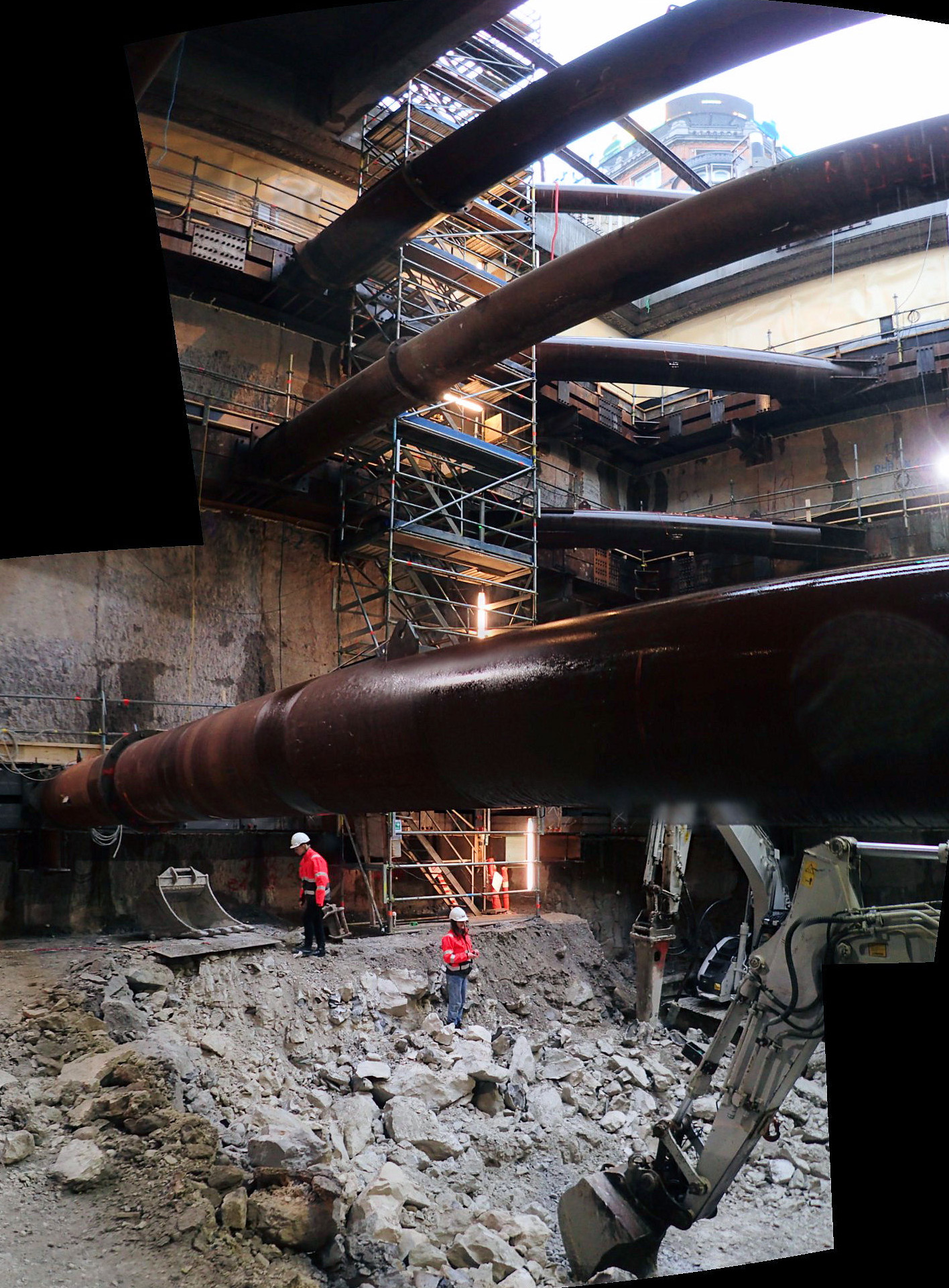 Danienkalk under Rådhuspladsen